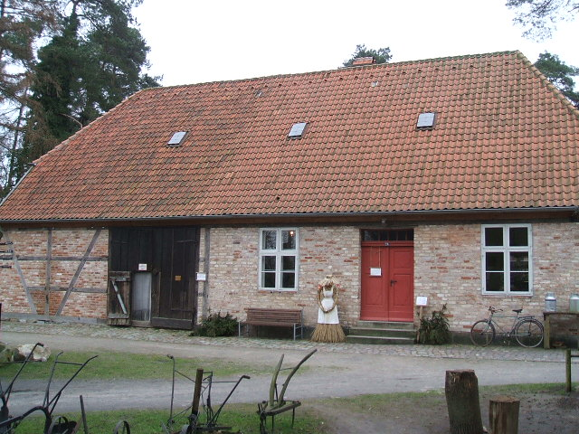 Ackerbürgerhaus im Tierpark Stralsund.